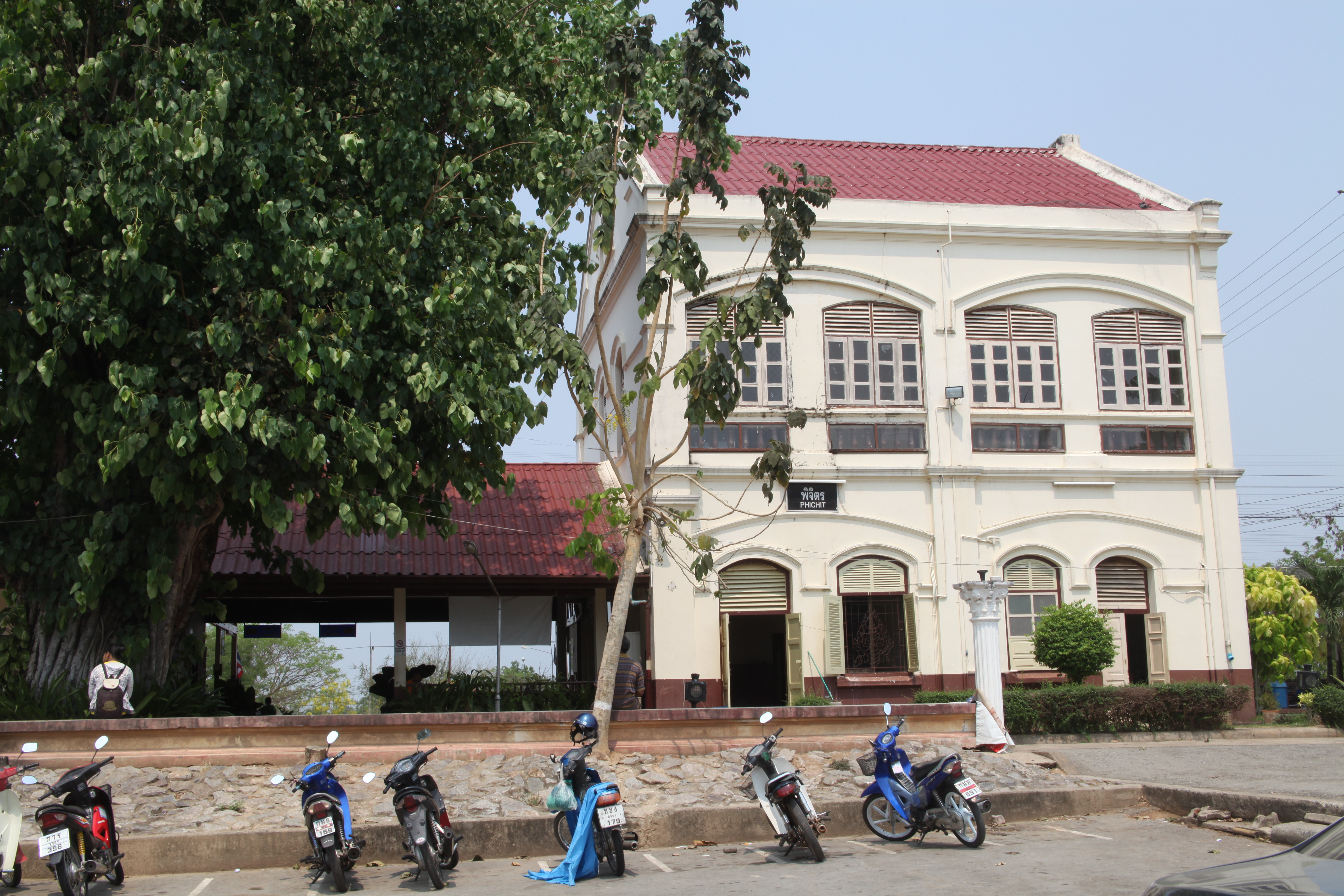 ピチット駅 2014年3月25日